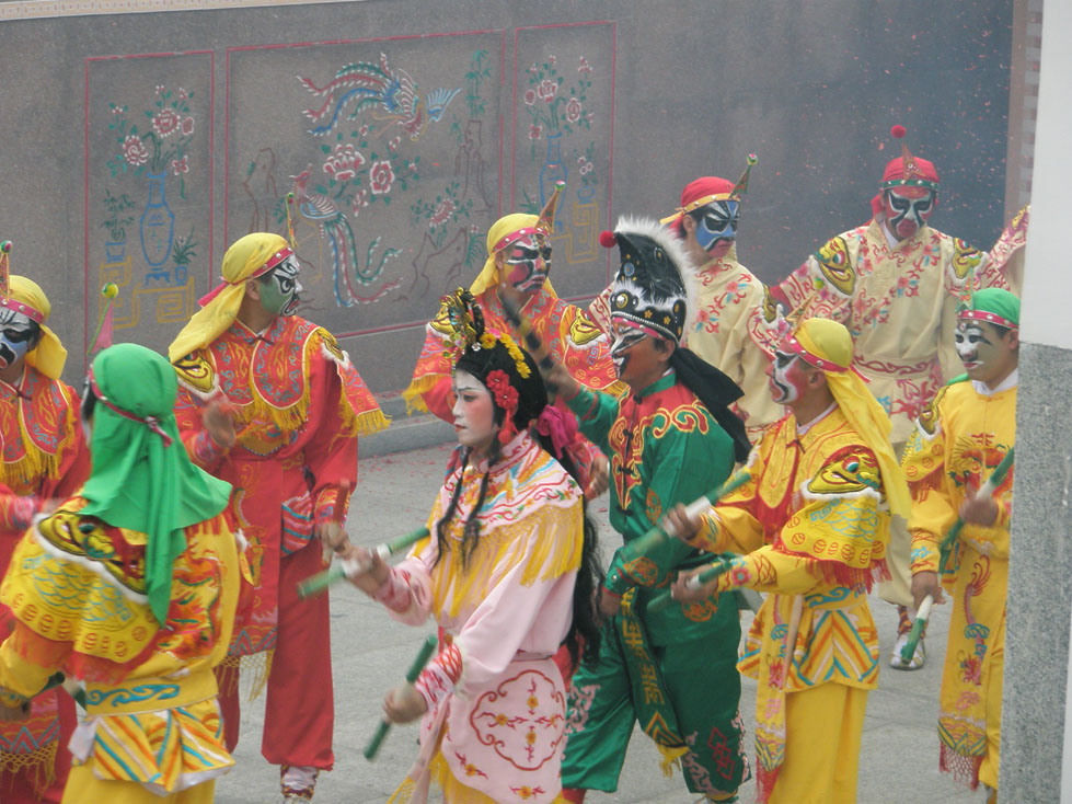 永丰英歌舞